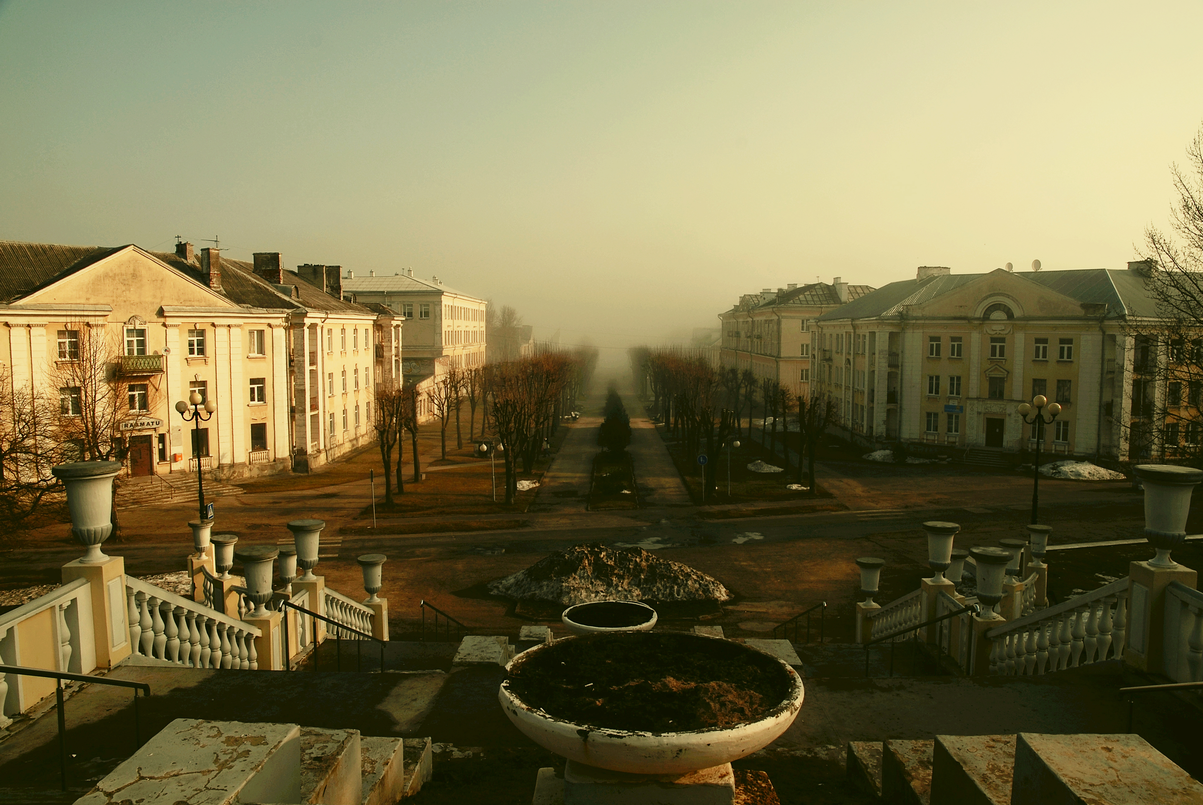 Sillamäe, Mere pst